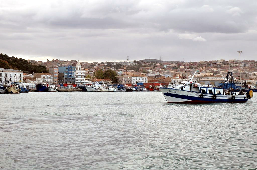 ghazaouet